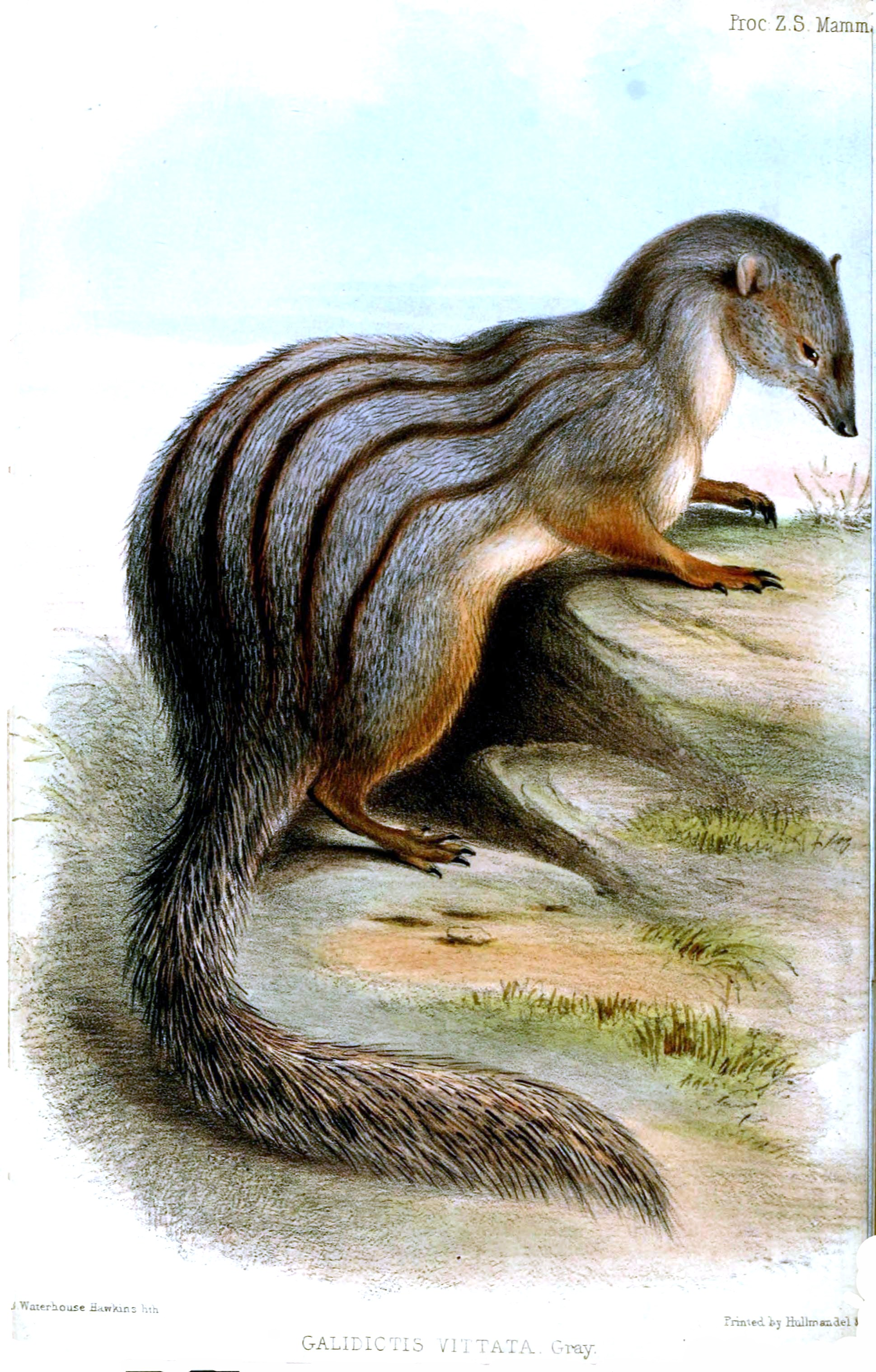 Galidictis vittata = Mungotictis decemlineata